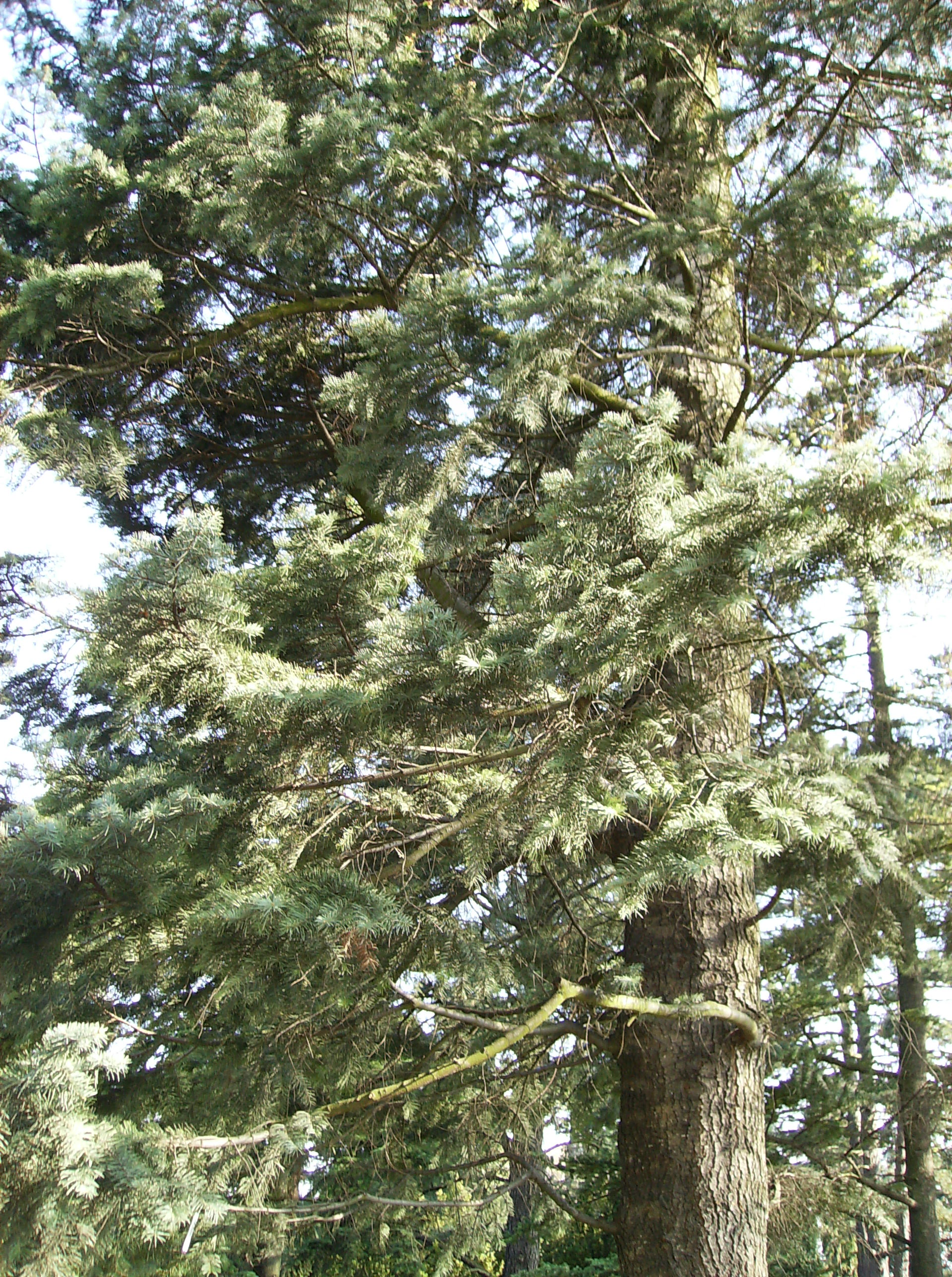 Abies concolor, Poznań, Polska.